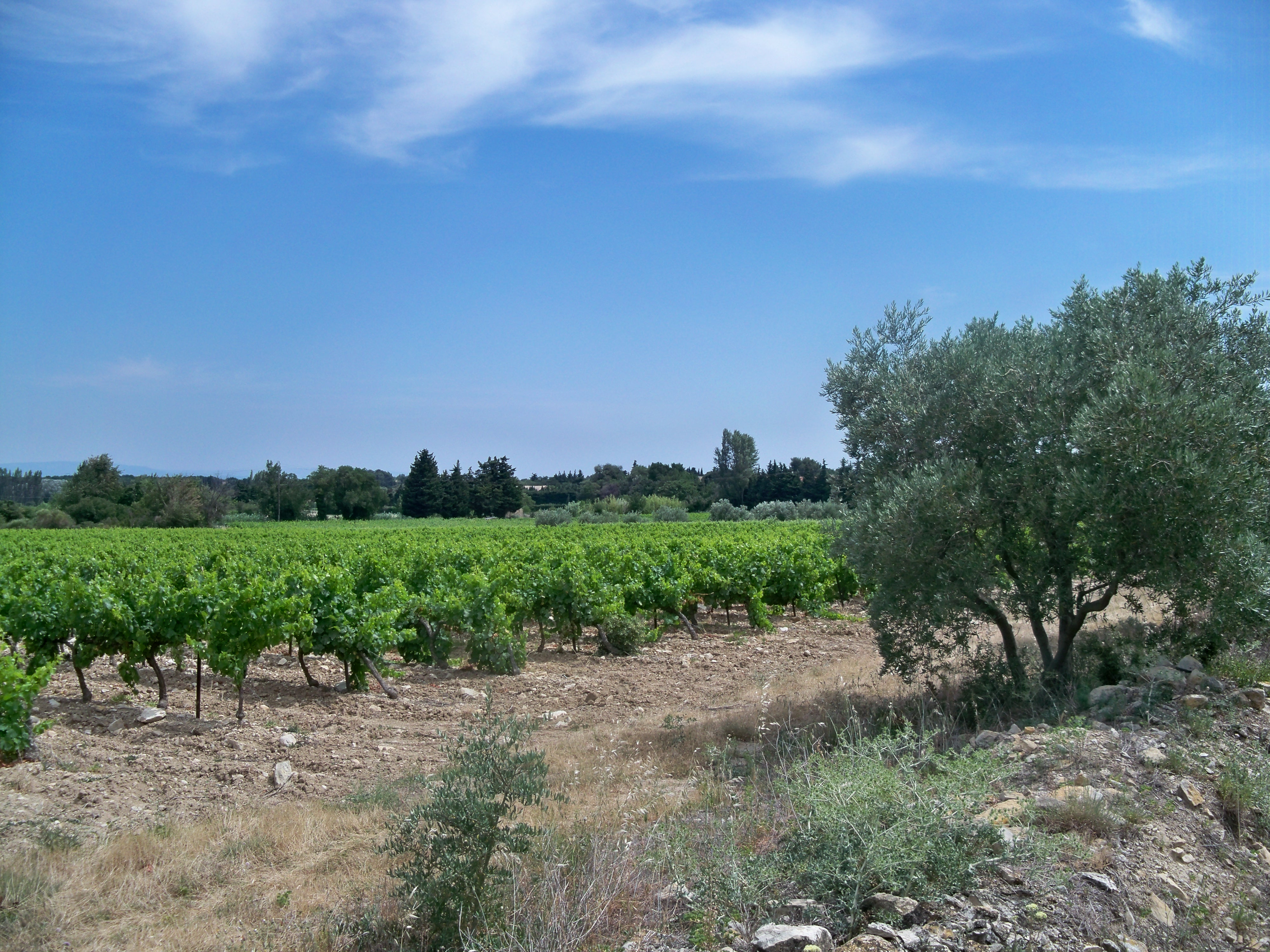 Oliviers et vgnes sur le terroir du Massif d'Uchaux, Vaucluse